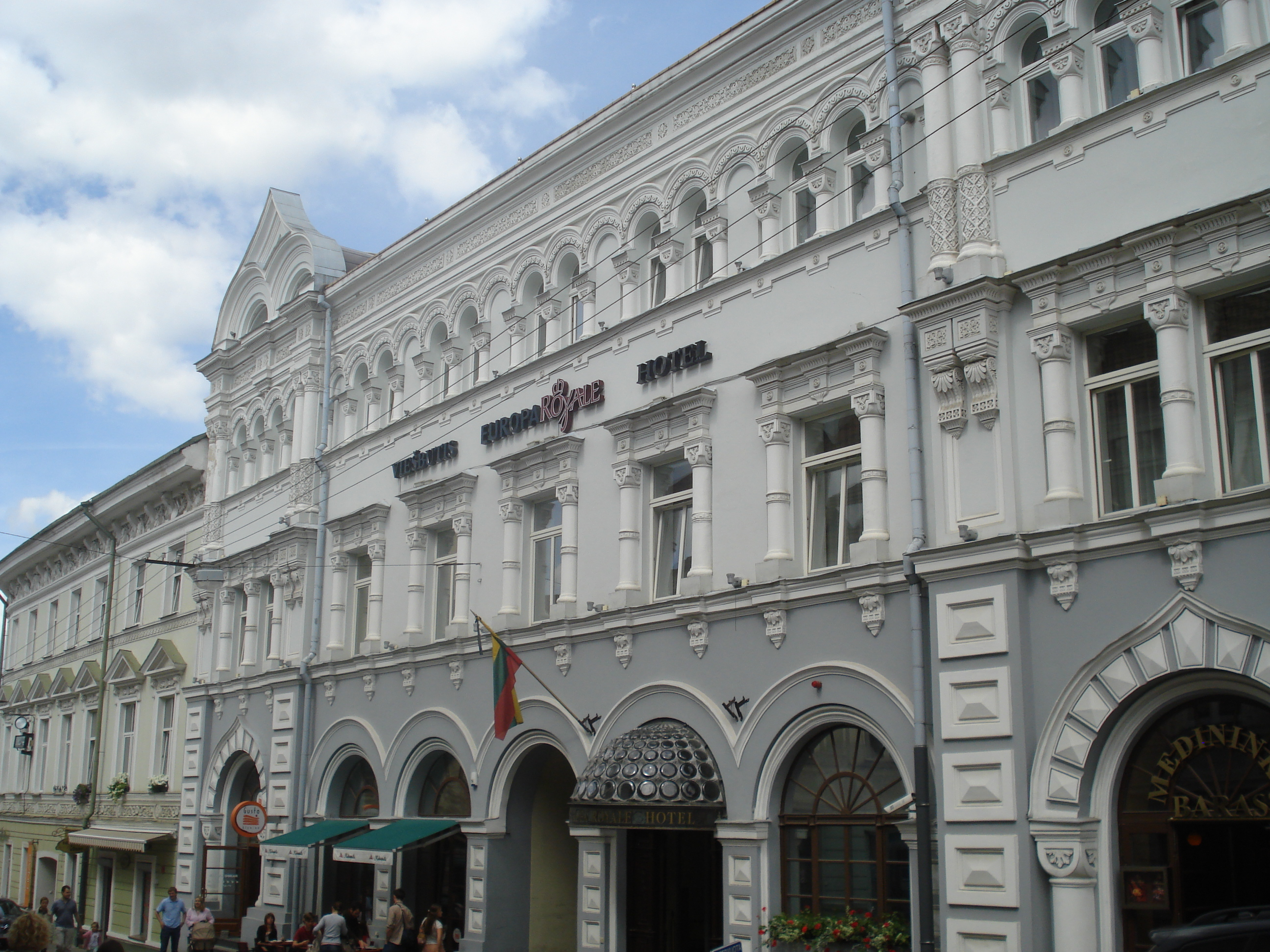 Neobizantic building in Vilnius, Aušros Vartų g. 6. Hotel "Europa"